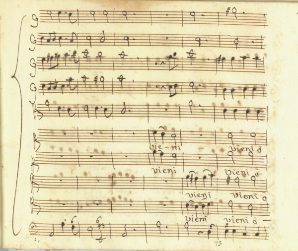 Une page du chœur « Vieni ò Re dell’alte sfere » extrait de la serenata « La gloria di primavera » (1716) d'Alessandro Scarlatti (Naples, Cantate 271 f° 103r).